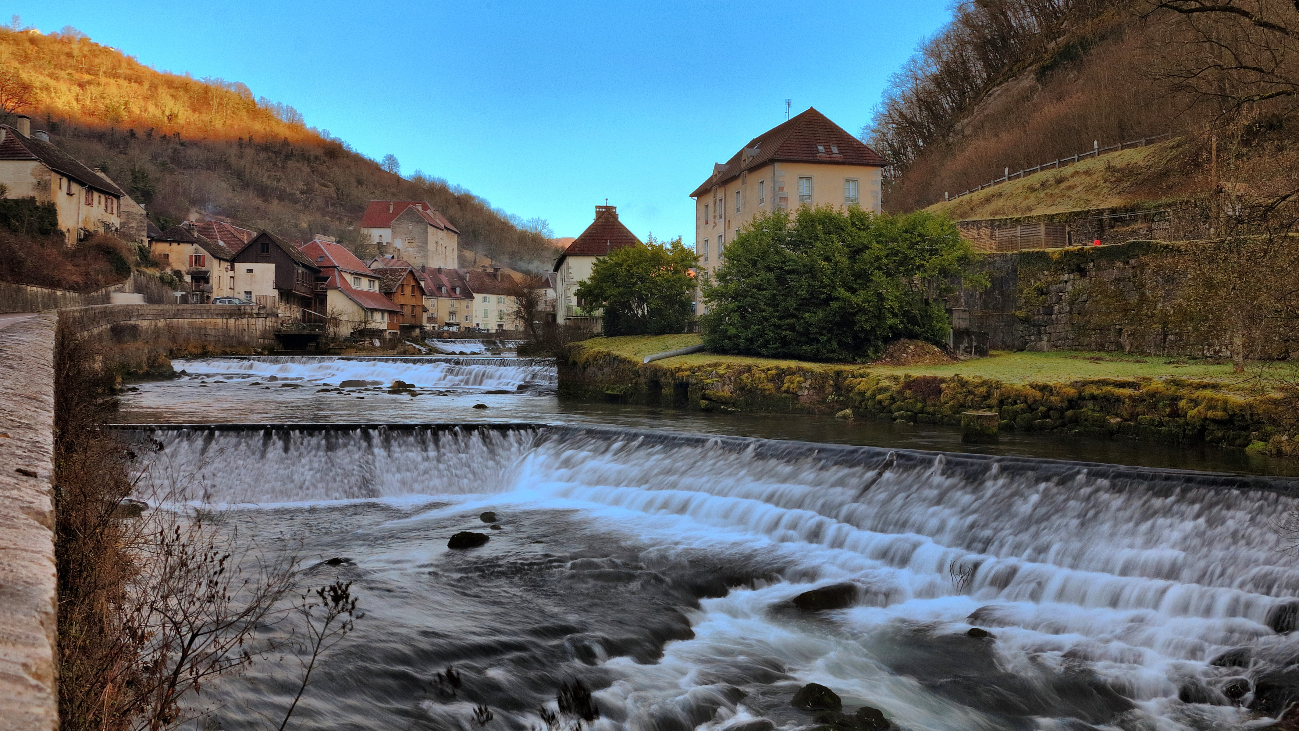 Barrages sur la Loue à Lods